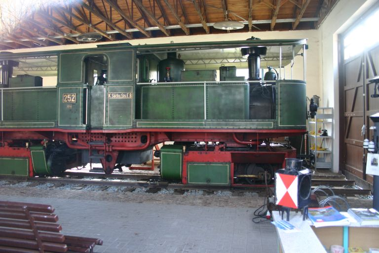 Innenansicht des Lokschuppens in Oberheinsdorf mit einer Sächsischen I M